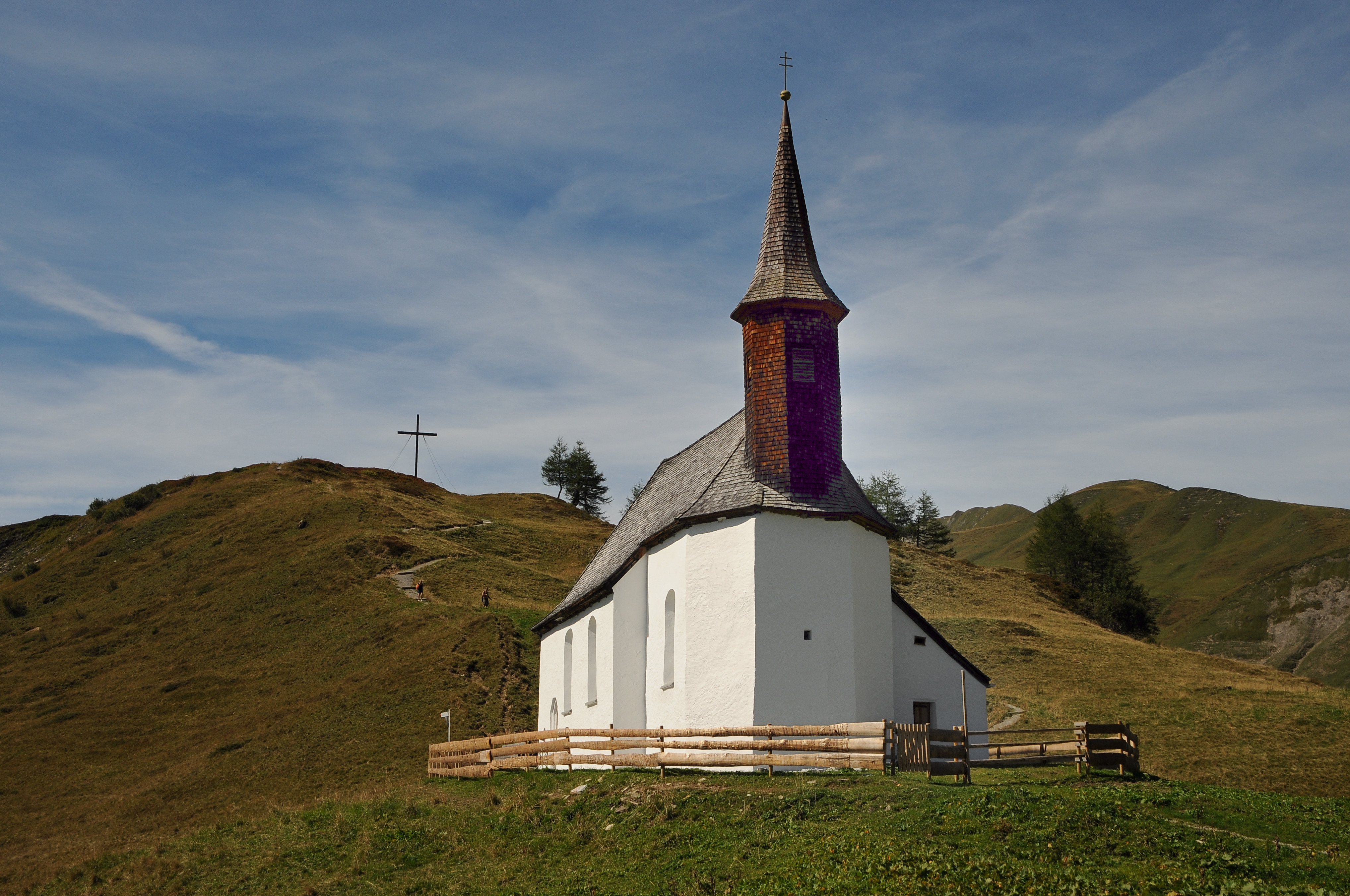 Kath. Pfarrkirche hl. Jakobus in Hochkrumbach bei Warth.